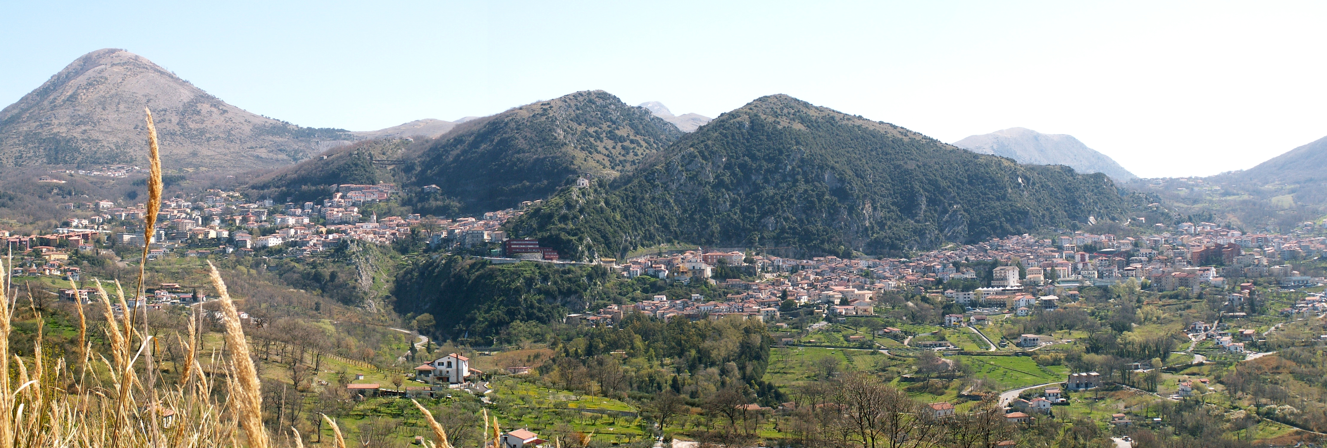 Il centro abitato di Lauria (PZ), Italia. Versione leggermente ritoccata.